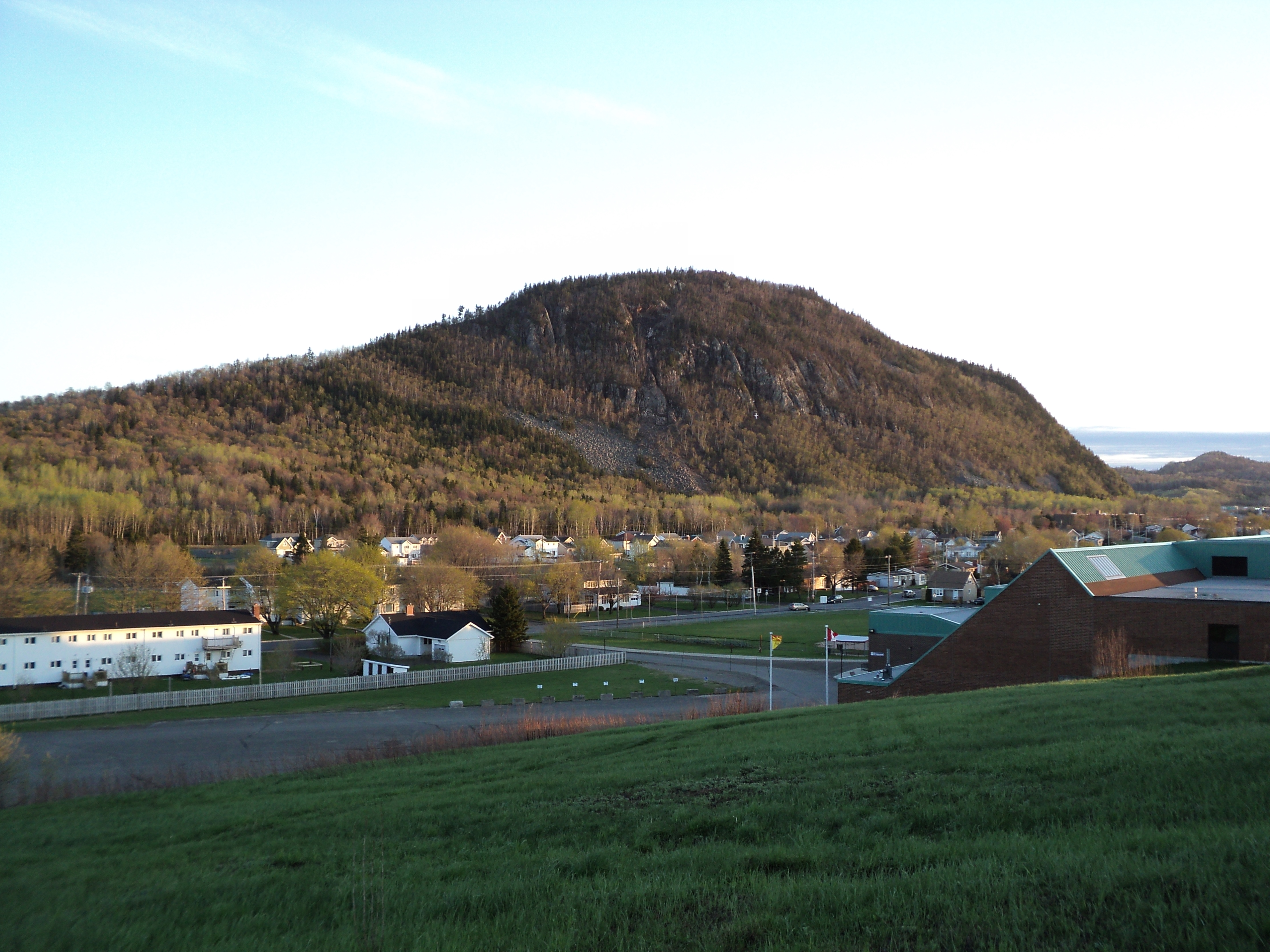 Sugarloaf Mountain